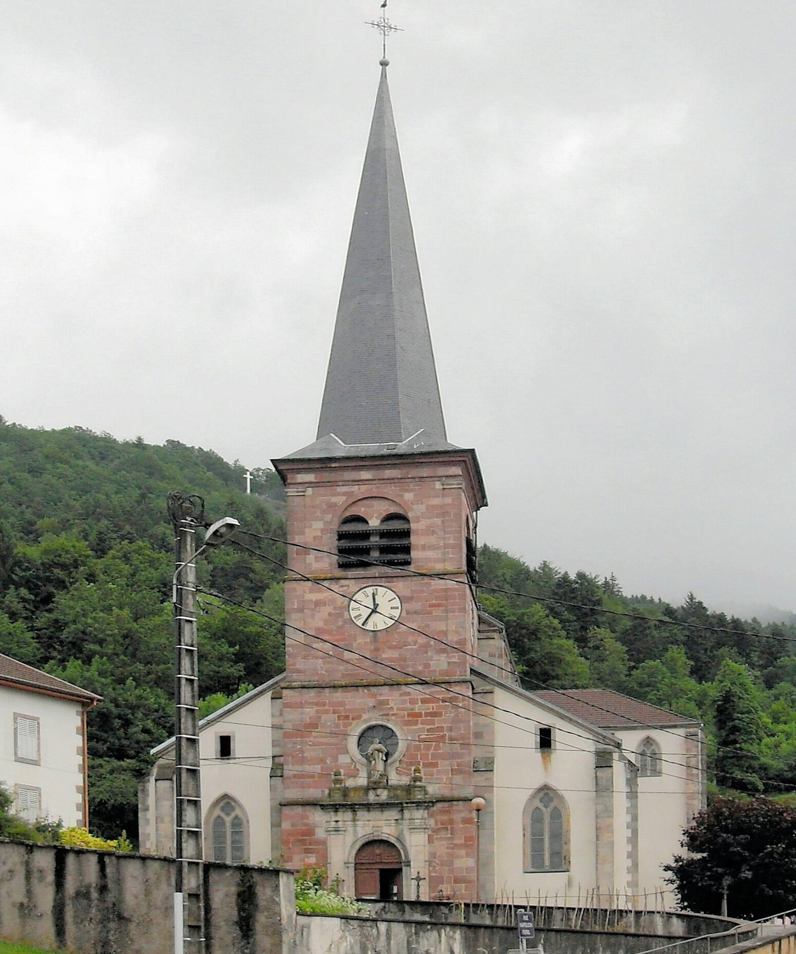 L'église Saint-Étienne à Rupt-sur-Moselle